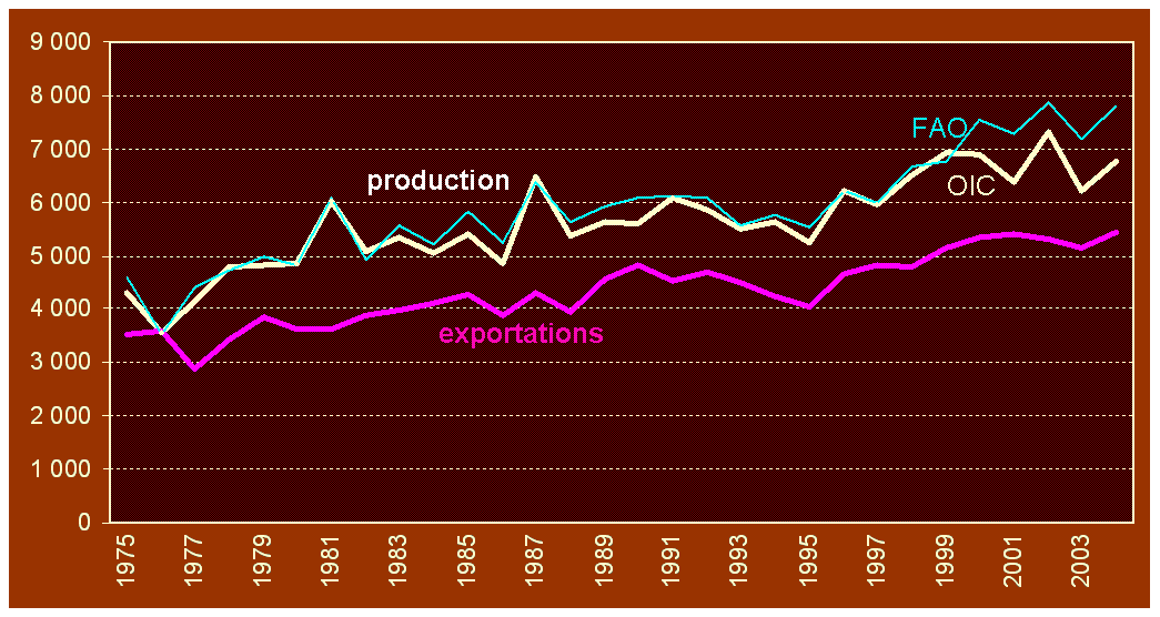 Volumen mundial de café verde producido y exportado entre 1975 y 2004 (en miles de toneladas) Fuente de los datos: bases públicas de la OIC y de la FAO (FAOSTAT) Coffee world yield (gross crop) from 1975 to 2004 in thousands of tons (kt) Source: International Coffee Organisation (database)